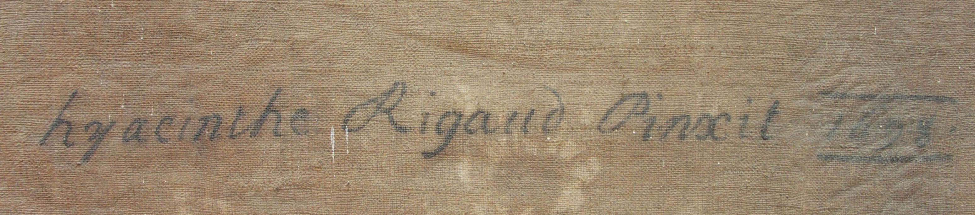 Grande signature de Rigaud